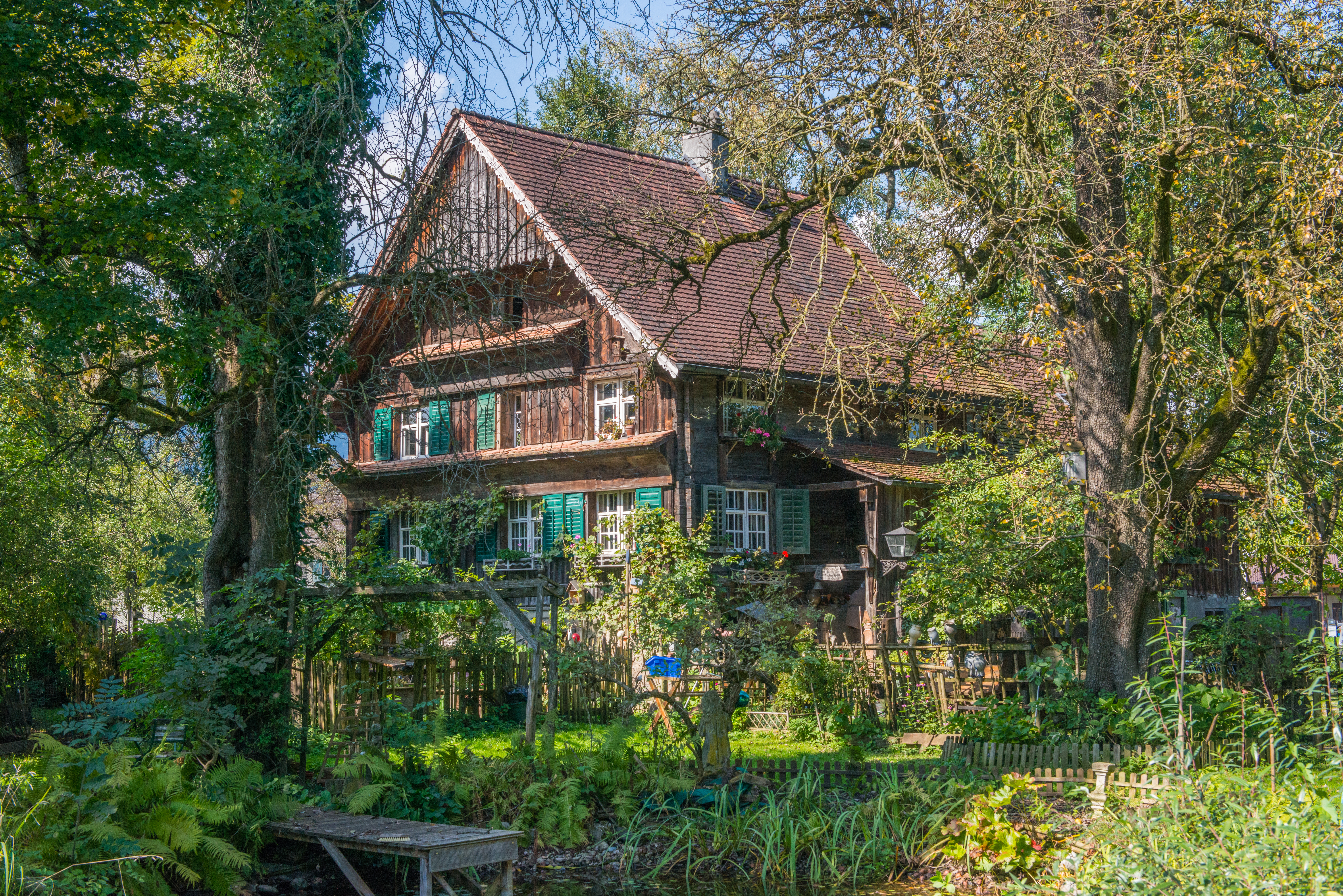 "Siebers Hus" Bauernhaus, Pferdewechselstation an der Hadeldorfstraße Nr.5 in Meiningen. Original Rheintalhaus, erbaut im 17. Jahrhundert. Nachvollziehbare Veränderungen im 18. Jahrhundert, Innenräume geprägt von der Zeit um 1900.